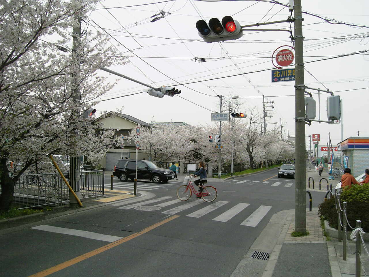 高安駅前交差点（大阪府道15号線及び大阪府道181号線交点） 写真右奥－左手前方向が大阪府道15号線。 写真右方向が大阪府道181号線。（本交点が起点） なお、大阪府道15号線の玉串川沿いは、桜並木になっている。